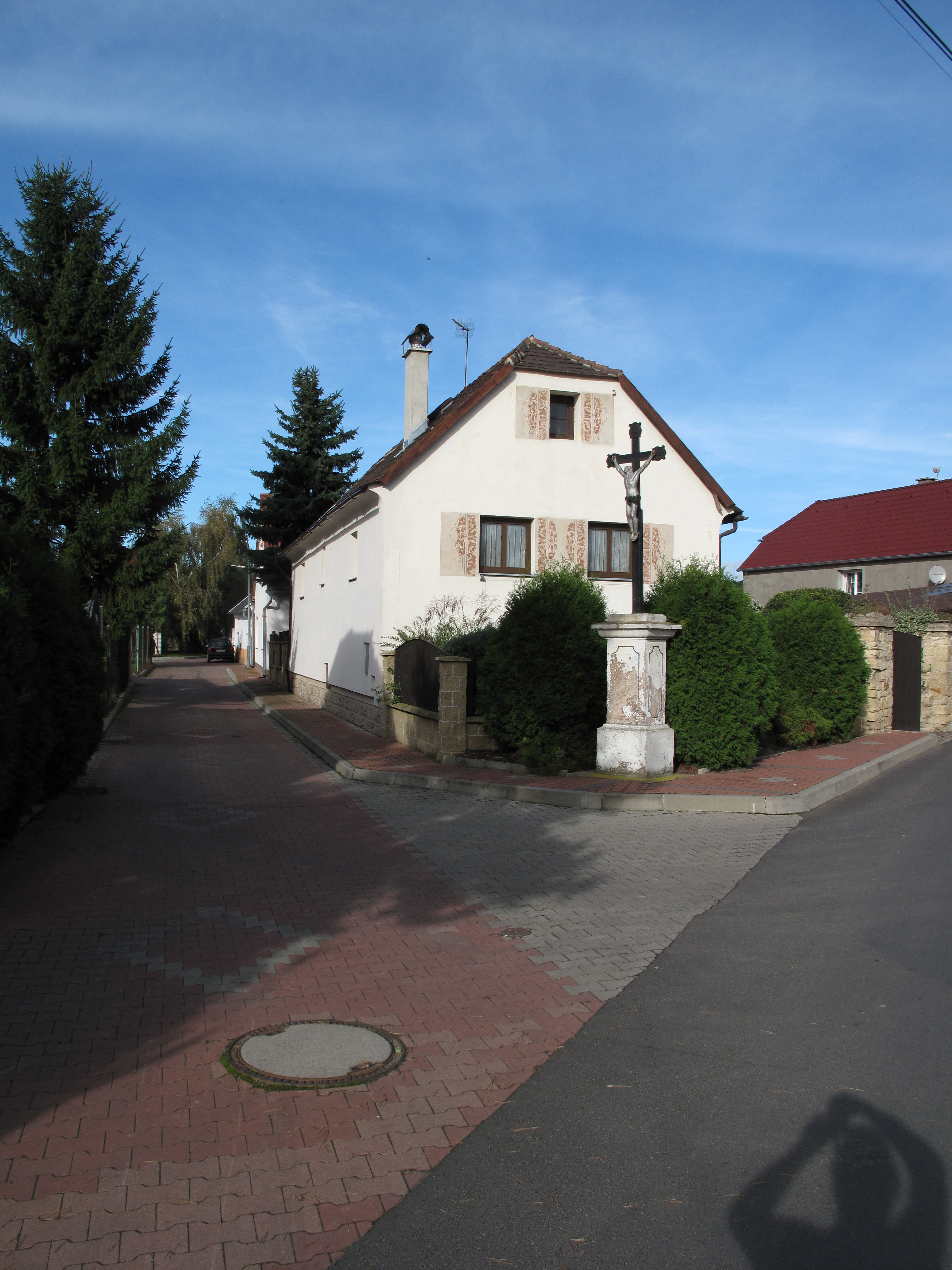 Boží muka v Píšťanech. Okres Litoměřice, Česká republika.